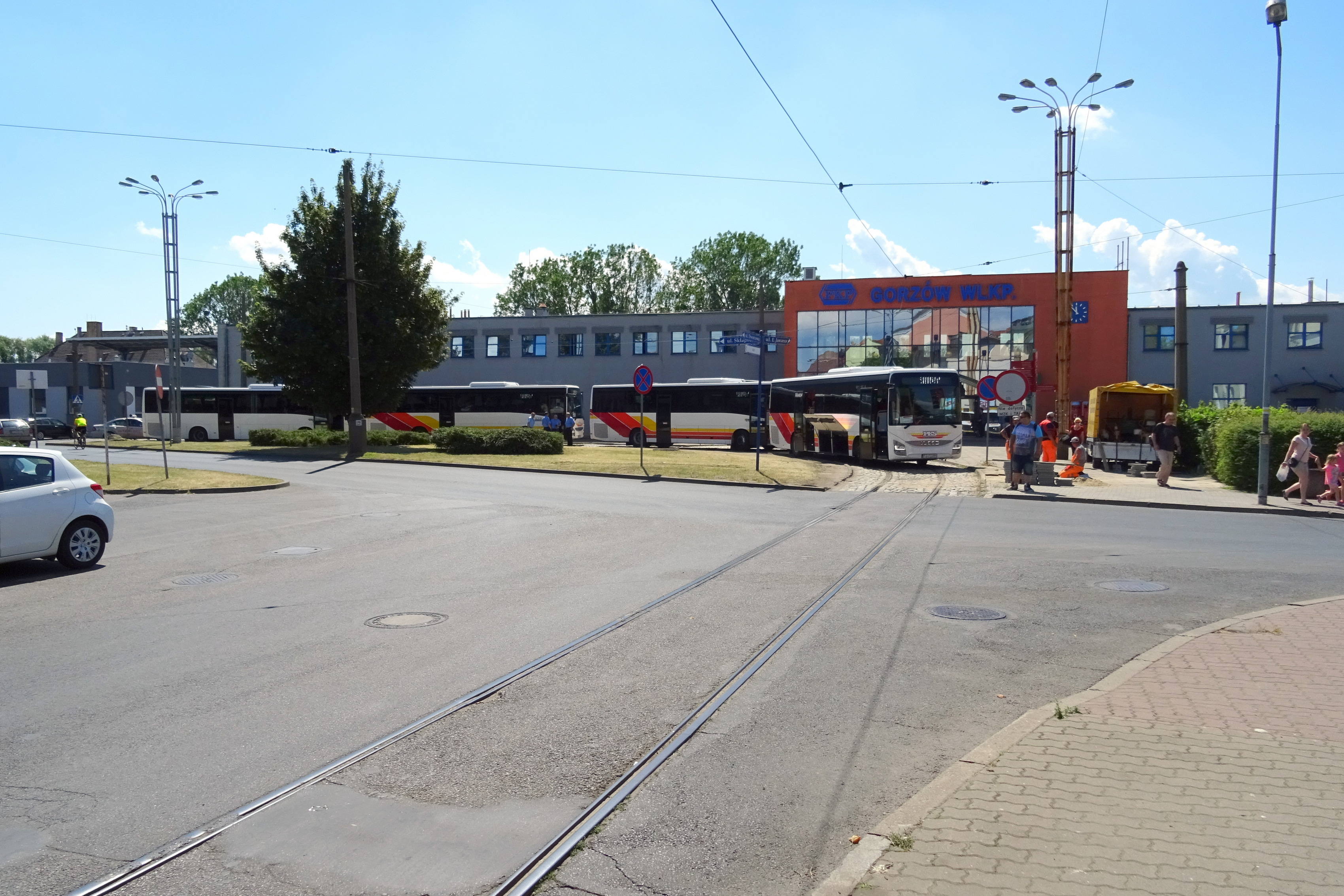 Stacja kolejowa "Gorzów Wlkp. Główny". Autobusy komunikacji zastępczej po zamknięciu przystanku "Gorzów Wlkp. Wschodni" dowożą pasażerów do stacji "Santok"